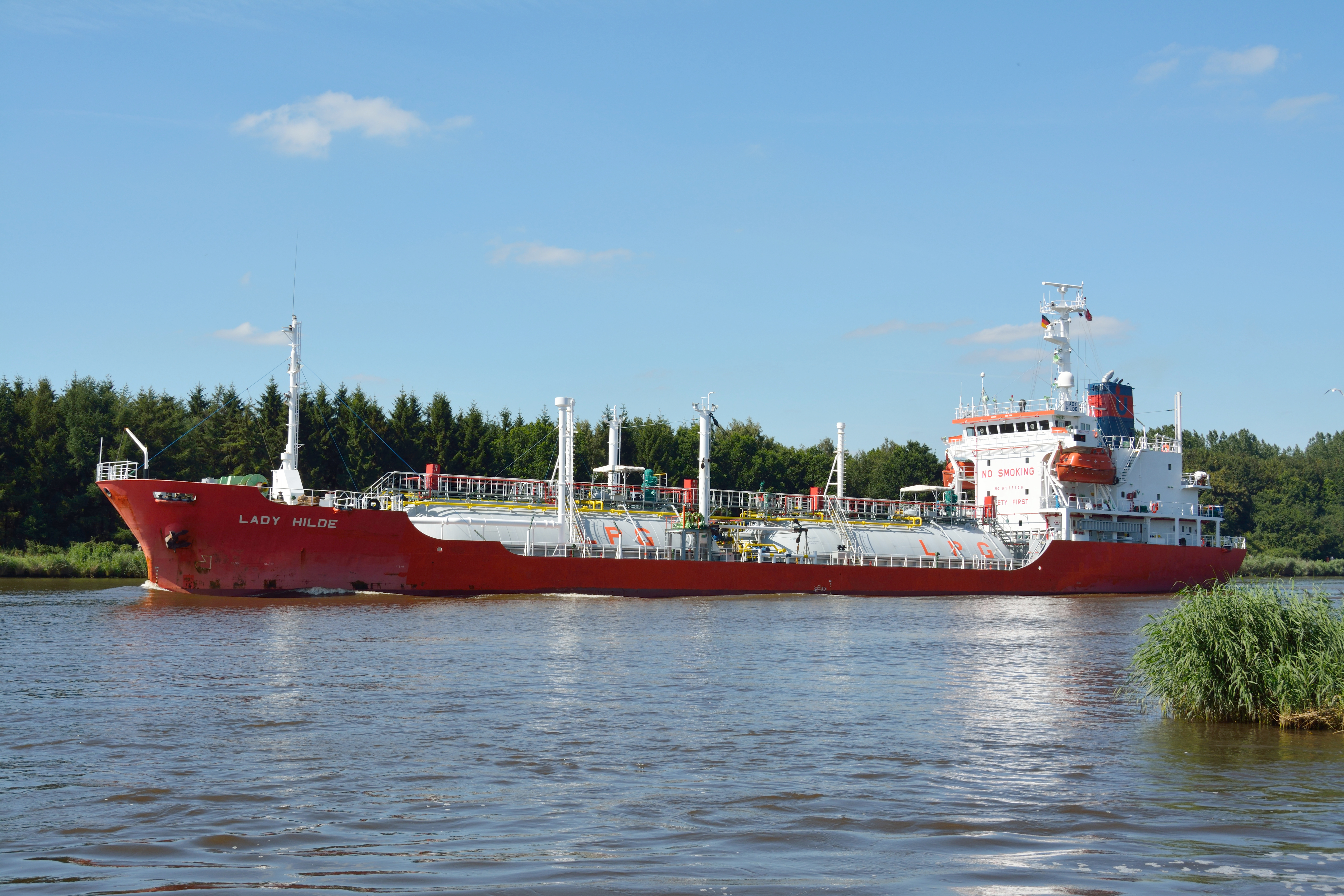 Die LADY HILDE im Nord-Ostsee-Kanal IMO: 9172129, MMSI: 565039000